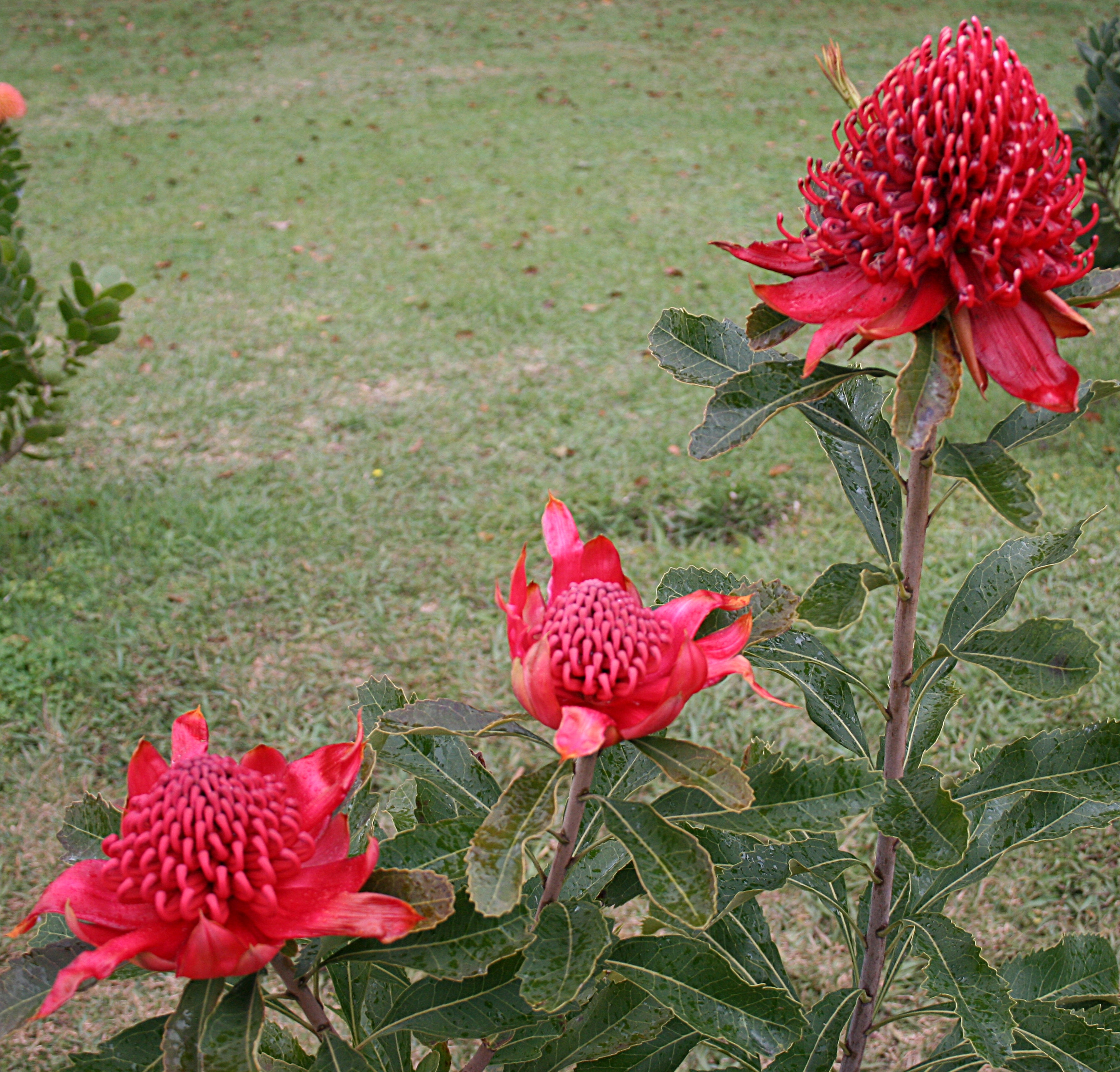 Telopea speciosissima Gardens of Quinta do Palheiro, Funchal, Madeira.